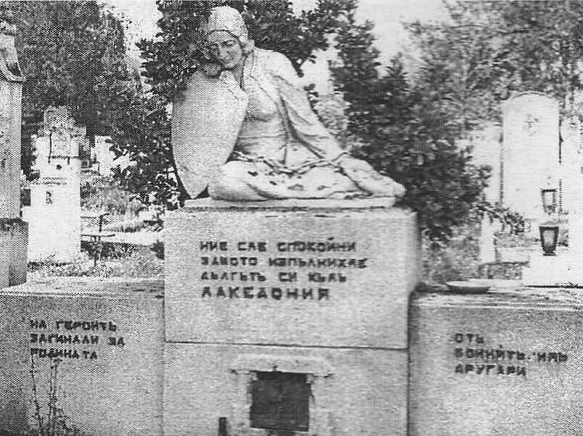 Паметник "Плачуща Македония" в гр.Кюстендил